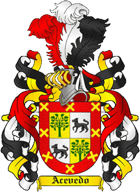 Escudo de armas del apellido Acevedo. Cuartelado. 1º y 4º en campo de oro, un acebo de sinople. 2º y 4º en campo de plata, un lobo de sable. En borde de gules, ocho sotueres de oro.